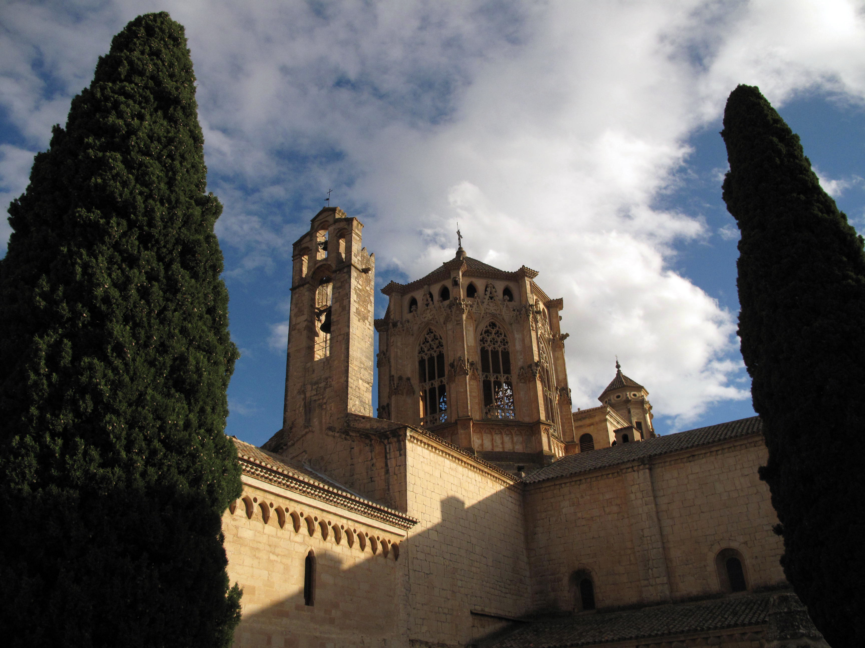 Monestir de Santa Maria de Poblet (Vimbodí i Poblet)